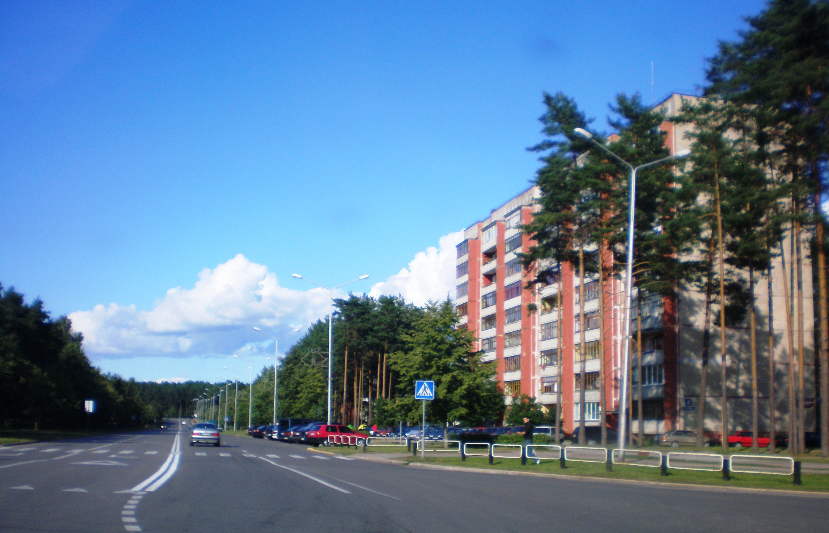 Висагинас, Литва